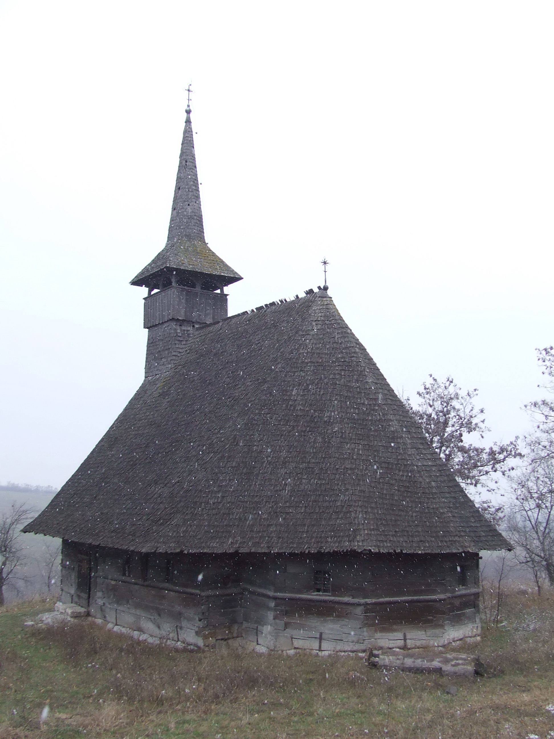 Biserica de lemn din Hotar, judeţul Bihor.